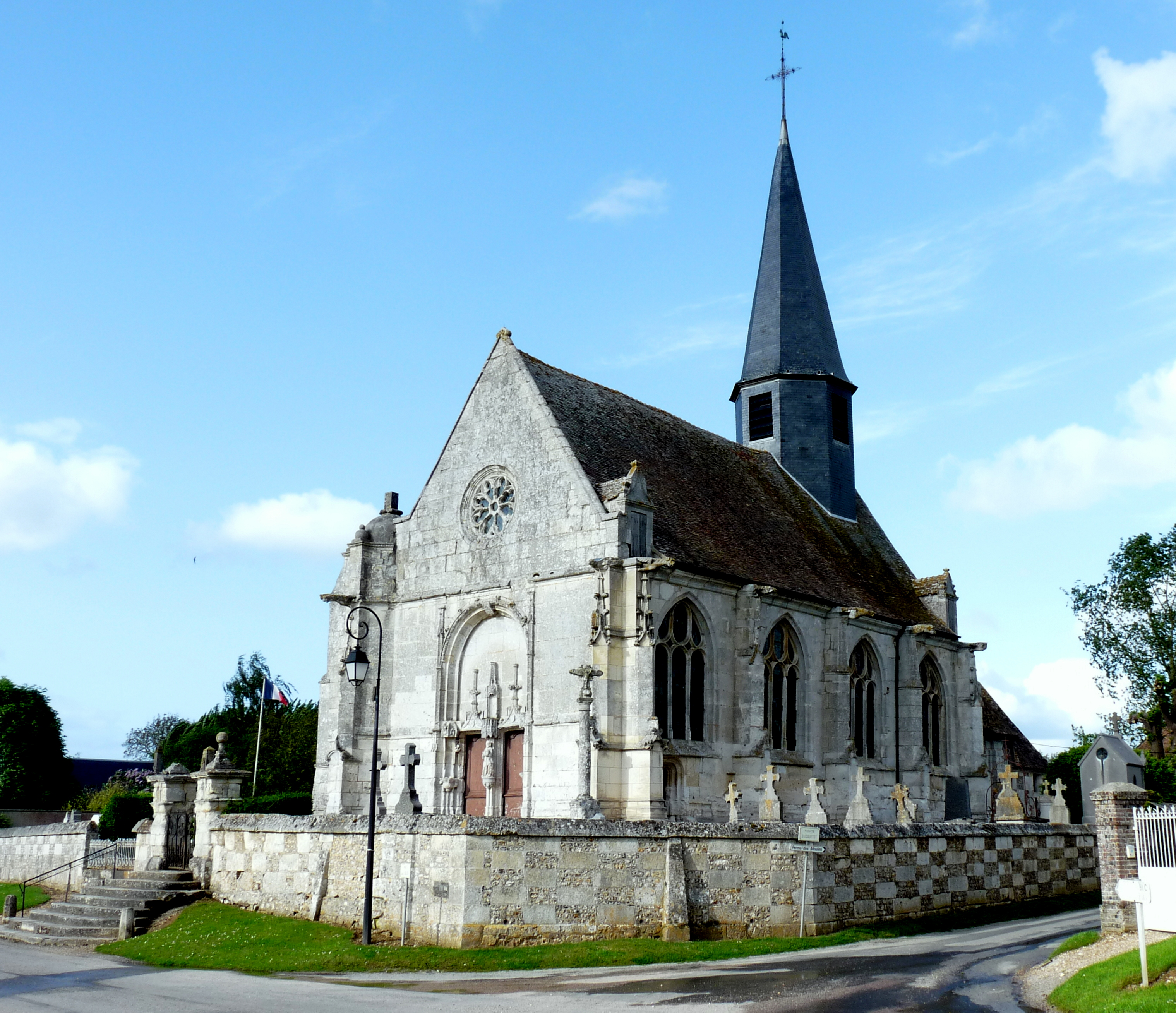 Église Notre-Dame de Cesseville .